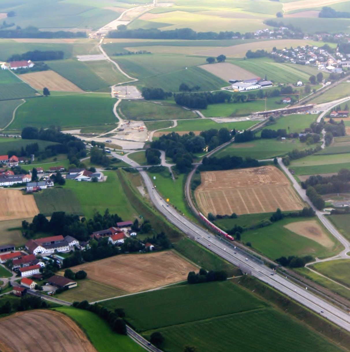 Anschlussstelle der A94 zur B12 bei Heldenstein im August 2016. Von rechts unten verläuft die A94 von Ampfing kommend Richtung Westen und schließt in der Bildmitte an die B12 Richtung Haag an. Rechts über der Bildmitte erkennt man die Bauarbeiten für das neue Teilstück der A94, das weiter nördlich als die B12 verläuft (Trasse Dorfen statt Trasse Haag). In etwa parallel zur zukünftigen Autobahn verläuft die Bahnstrecke München–Mühldorf. Links im Bild befindet sich ein Ortsteil von Heldenstein.